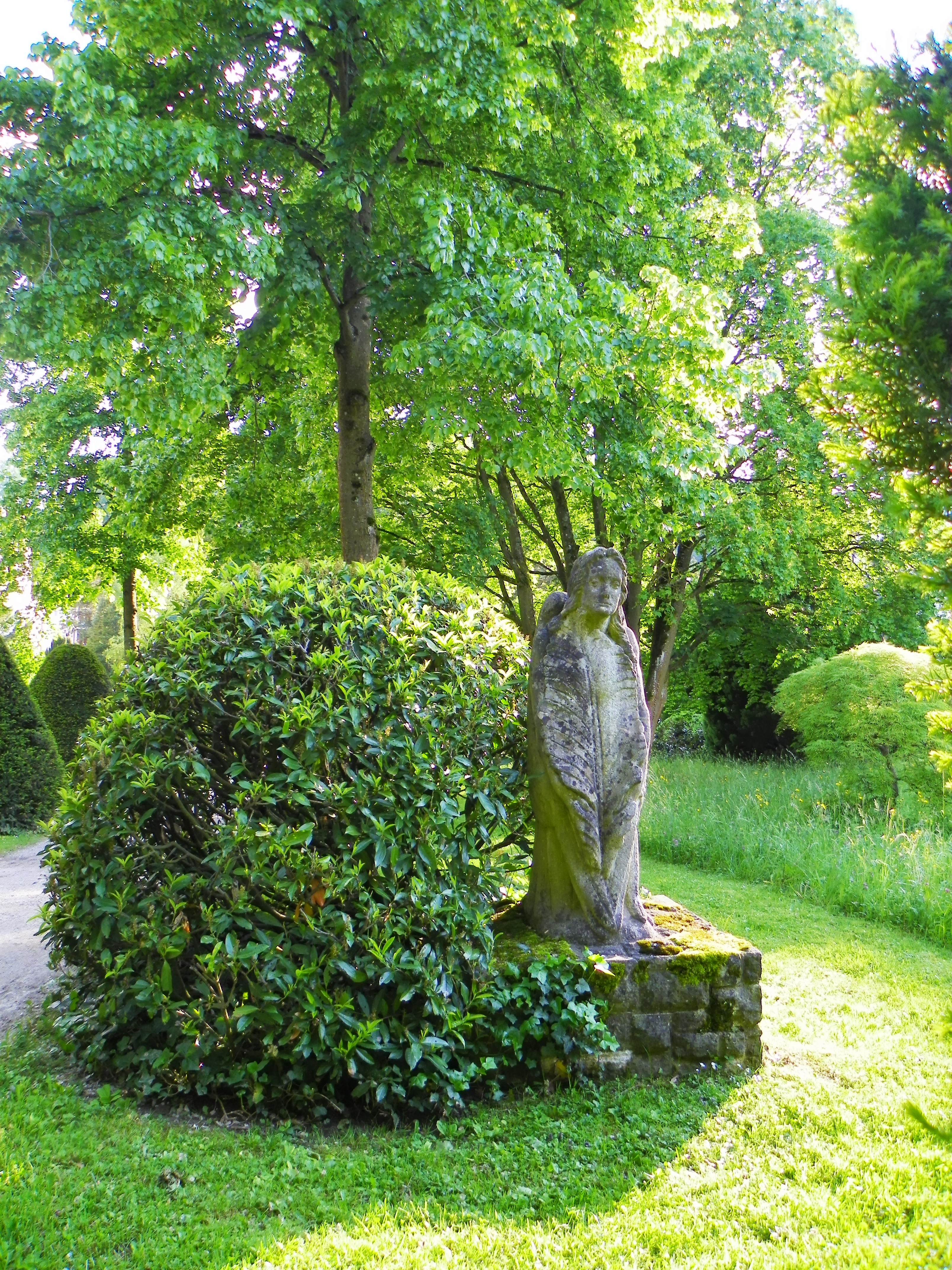 Kurpark in Baden, Schweiz